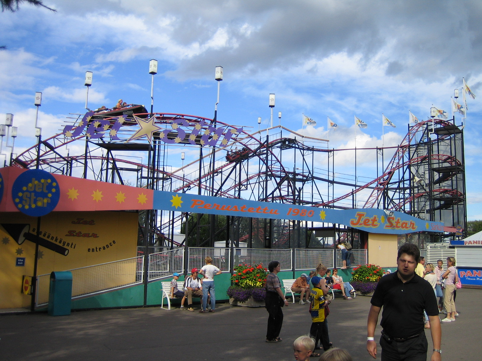 Särkänniemen Jet Star -vuoristorata